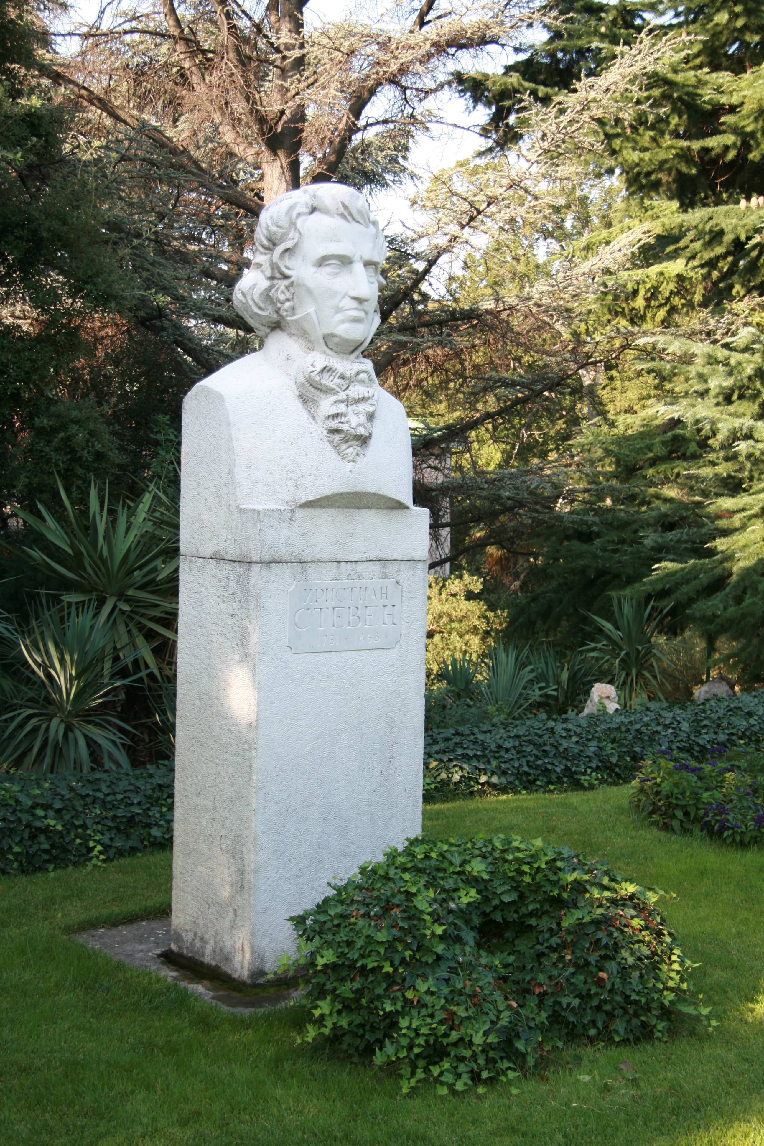 Нікітський ботанічний сад, м. Ялта, сел. Нікіта